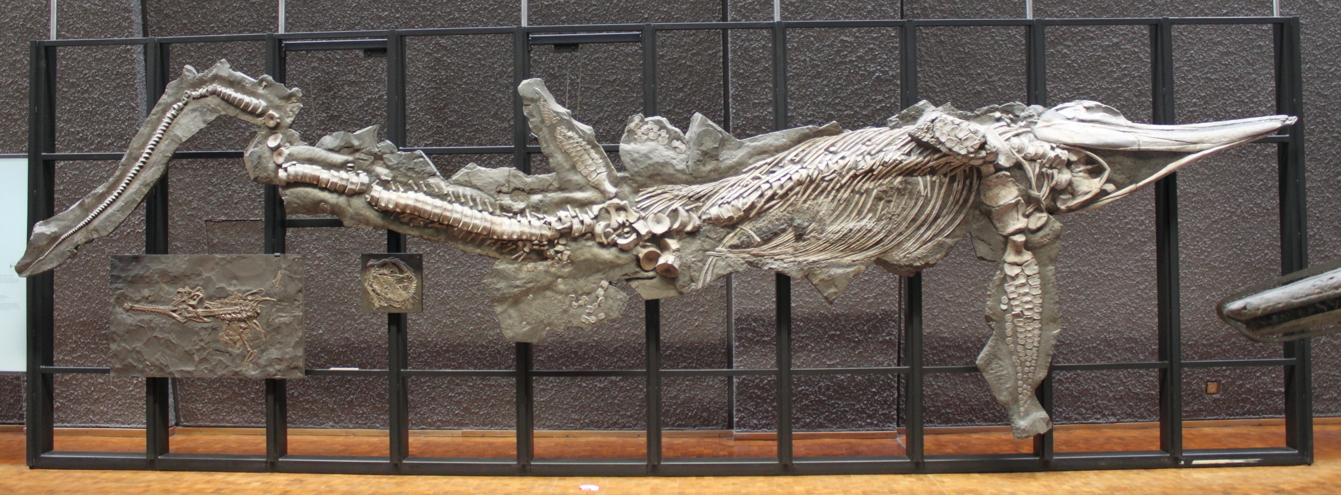 Temnodontosaurus aus dem SMNS